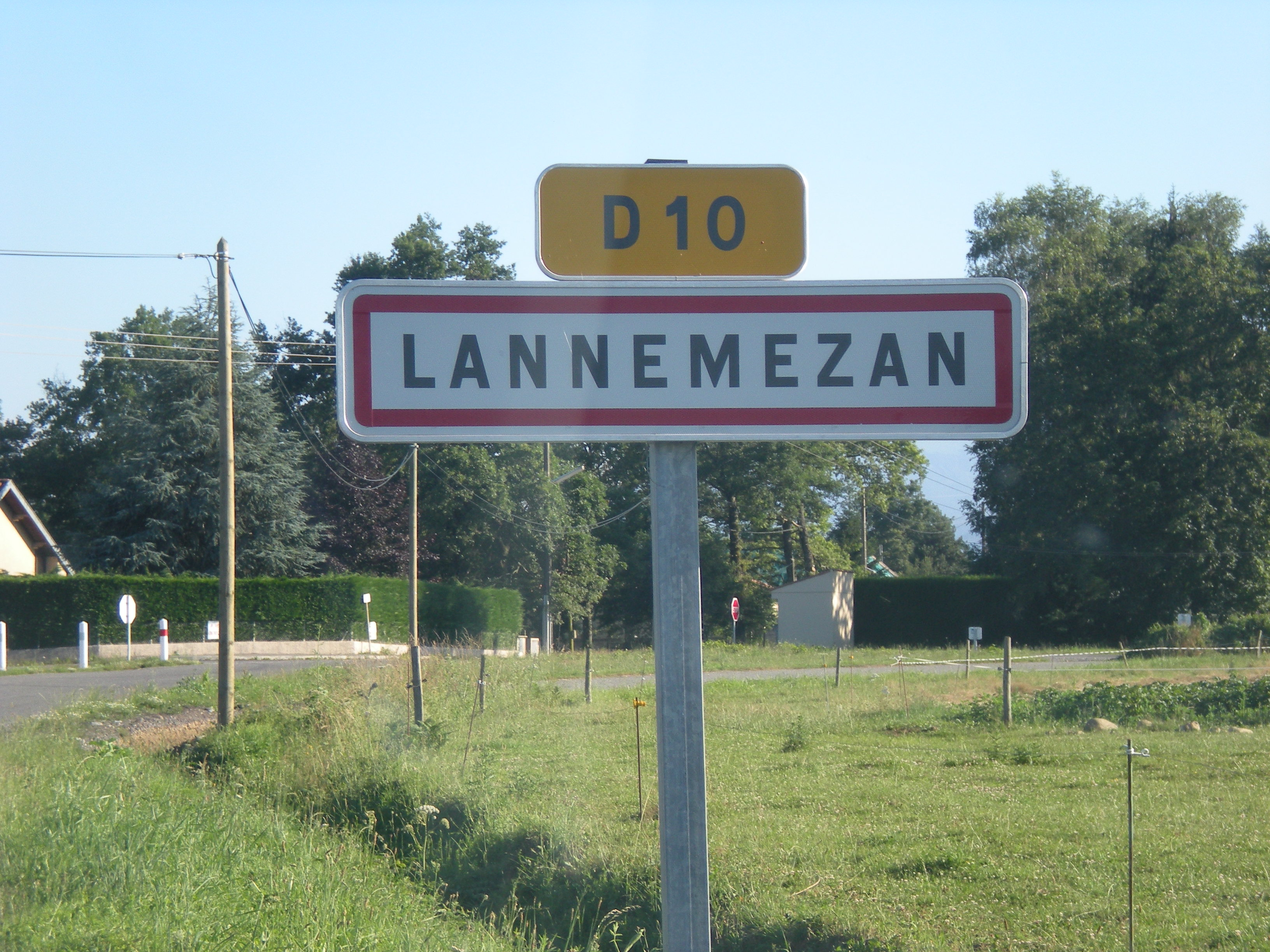 Panneau d'entrée de ville Lannemezan, route de Clarens